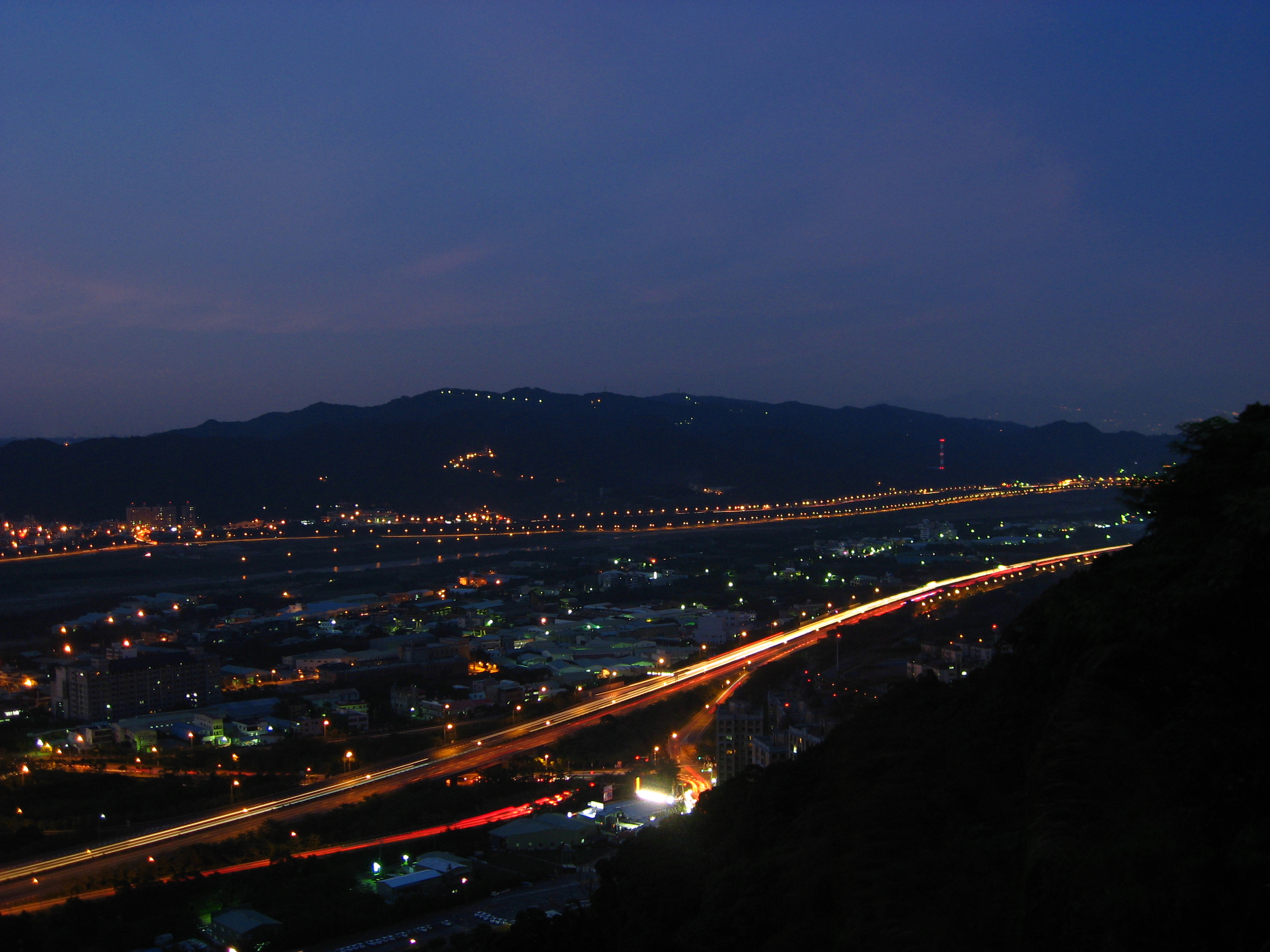 福爾摩沙高速公路三鶯交流道與周邊道路夜景。